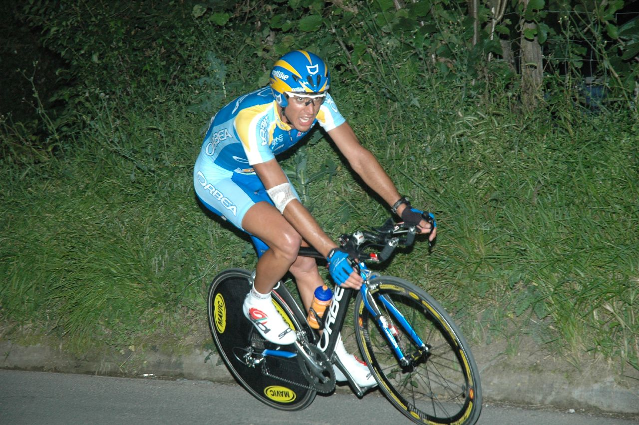 Aaron Villegas, Euskal Bizikleta 2007